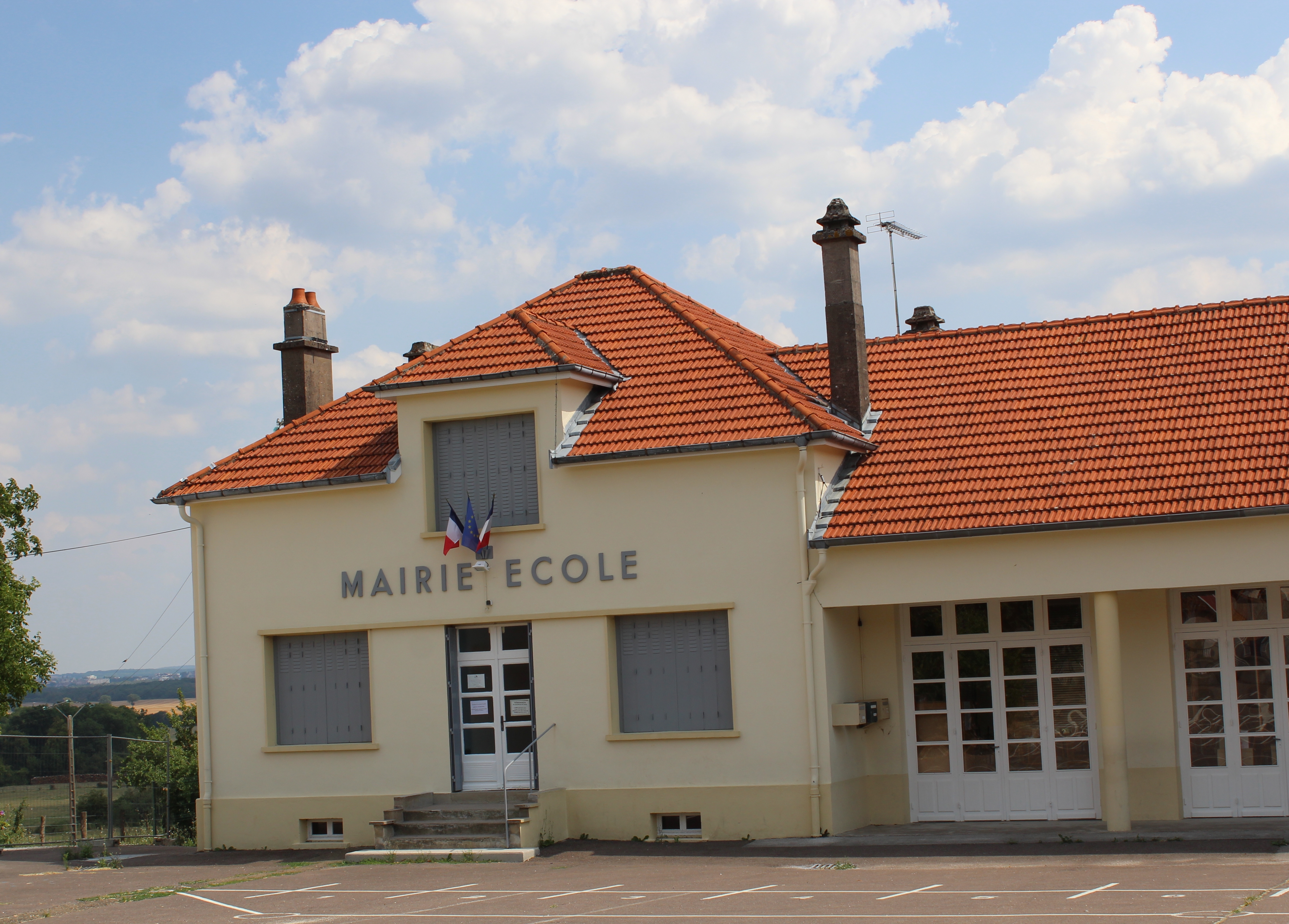 La mairie